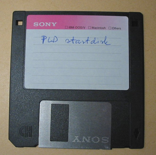 Floppy disk / Dyskietka / Diskette